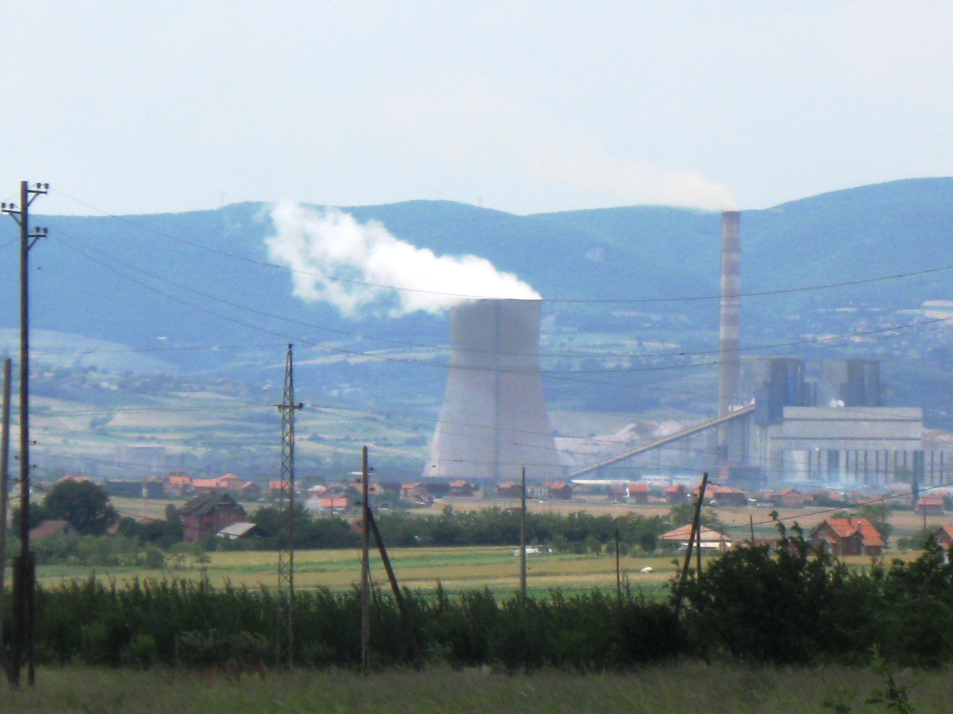 snimak Radosava Stojanovica